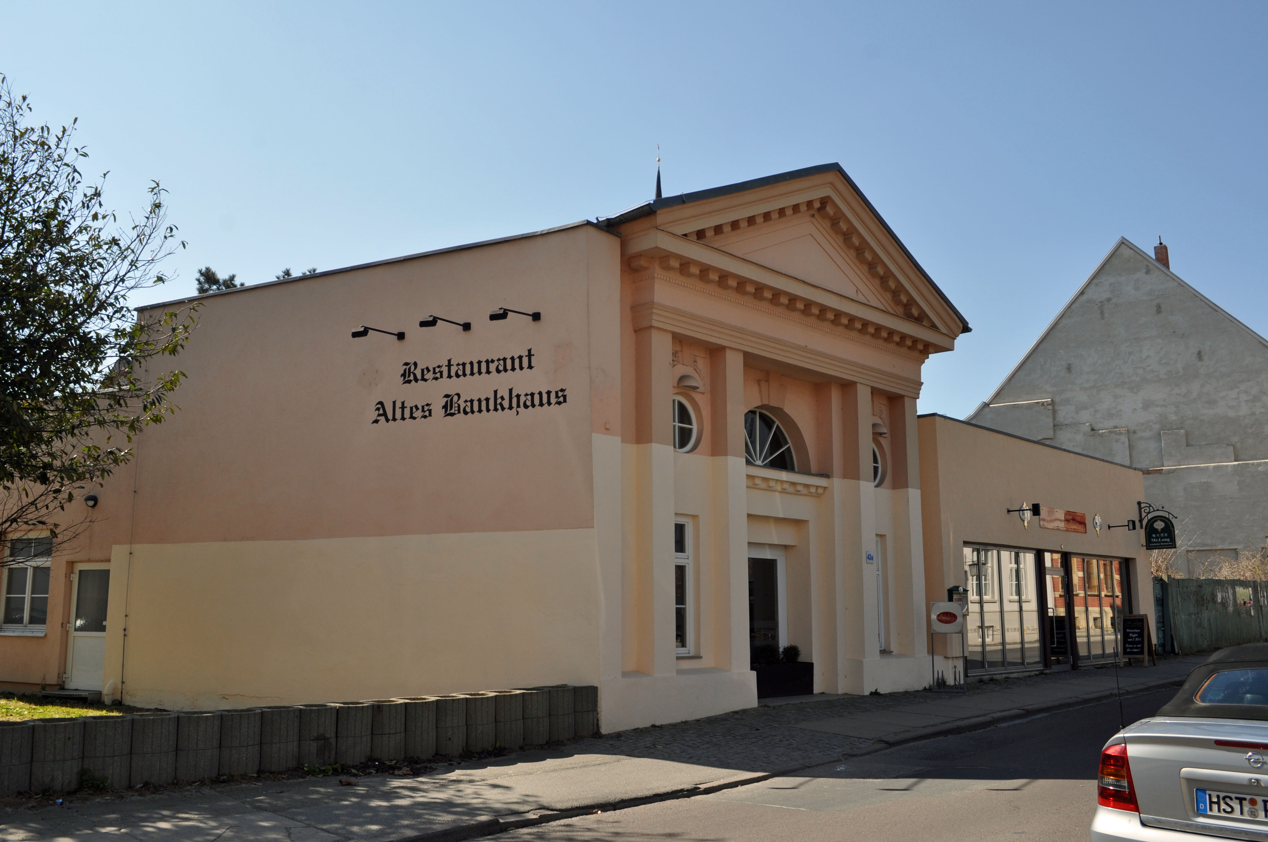 Gebäude bzw. Gebäudedetail in Stralsund. Straße und Hausnummer siehe Dateiname.